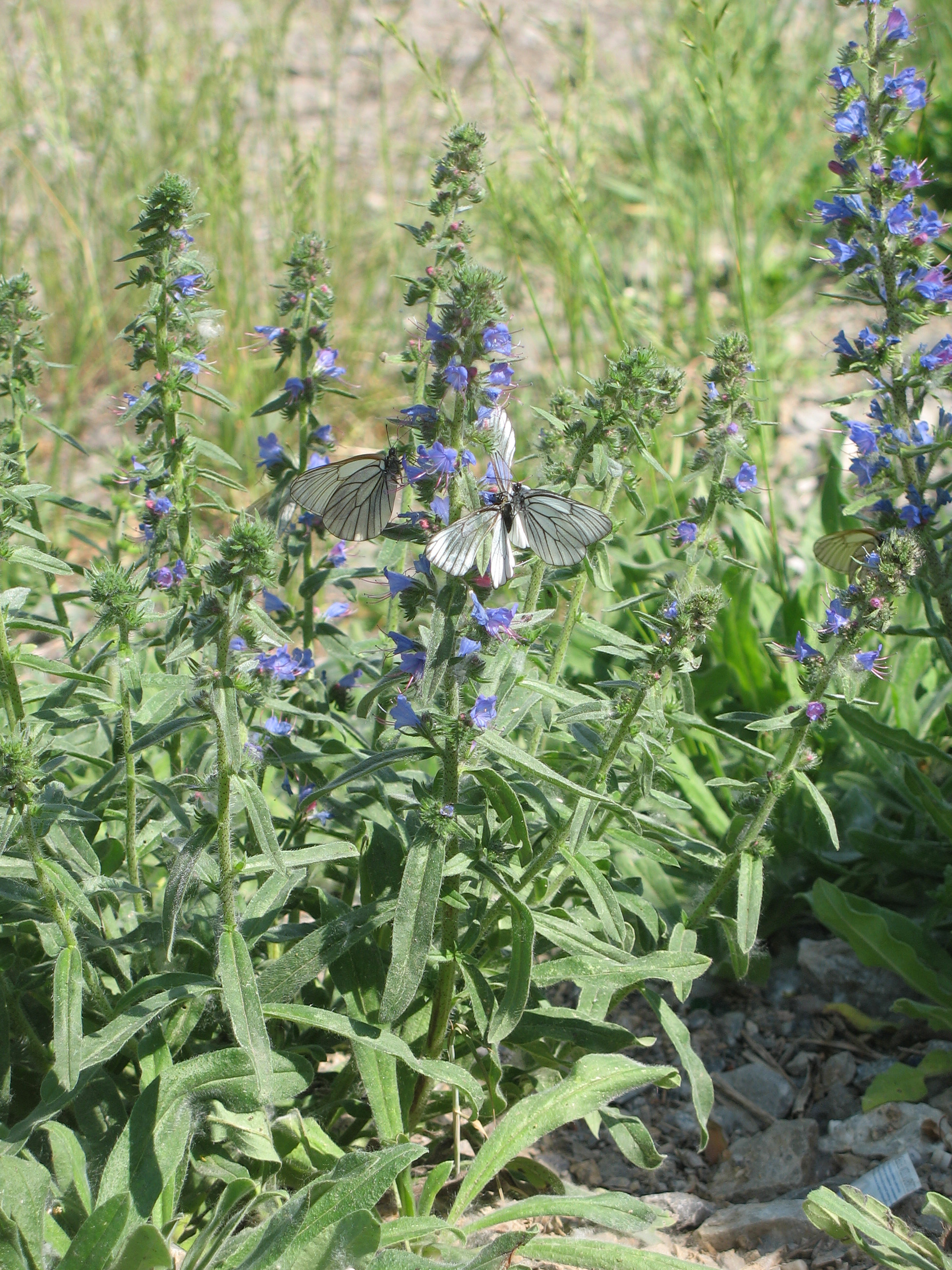 В санатории Курьи Свердловской области